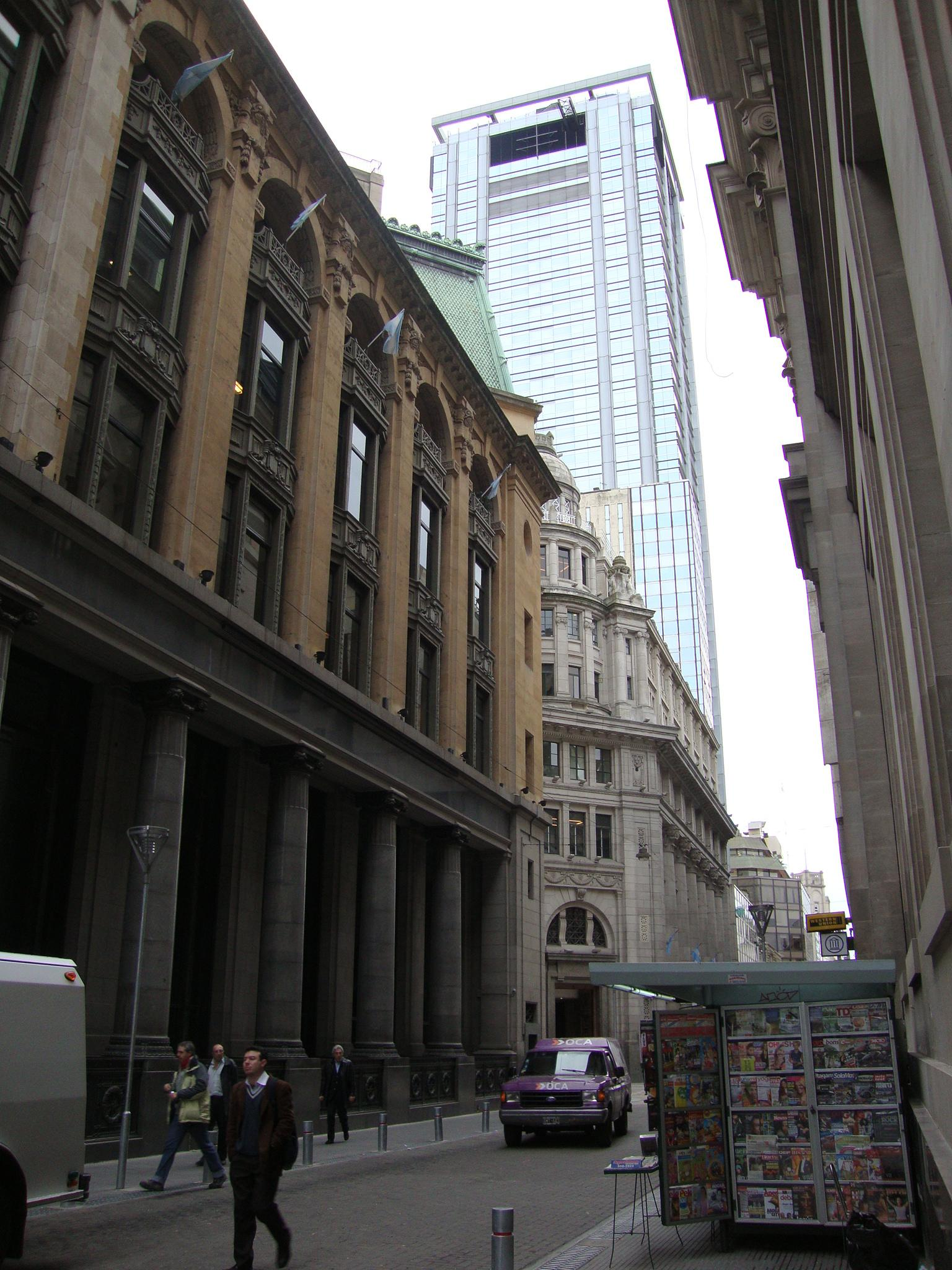 Vista de la calle Reconquista en la cuadra 0-100, mirando hacia el norte. A la izquierda el "Palacio de la Reconquista", detrás el Reconquista Plaza y la Torre Galicia Central. A la izquierda, Banco de la Nación. Buenos Aires, Argentina.